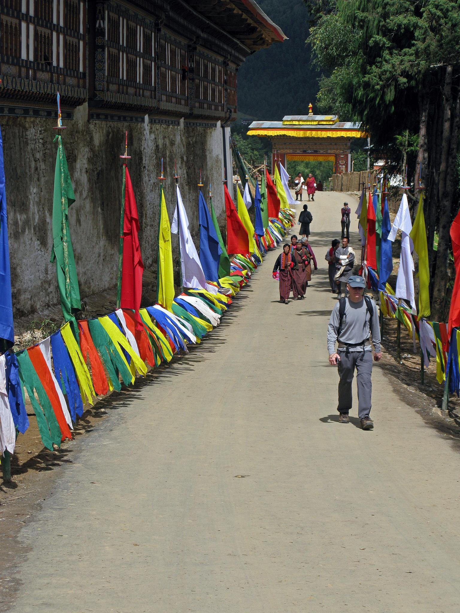 Jim Festival Street Gangte Goemba